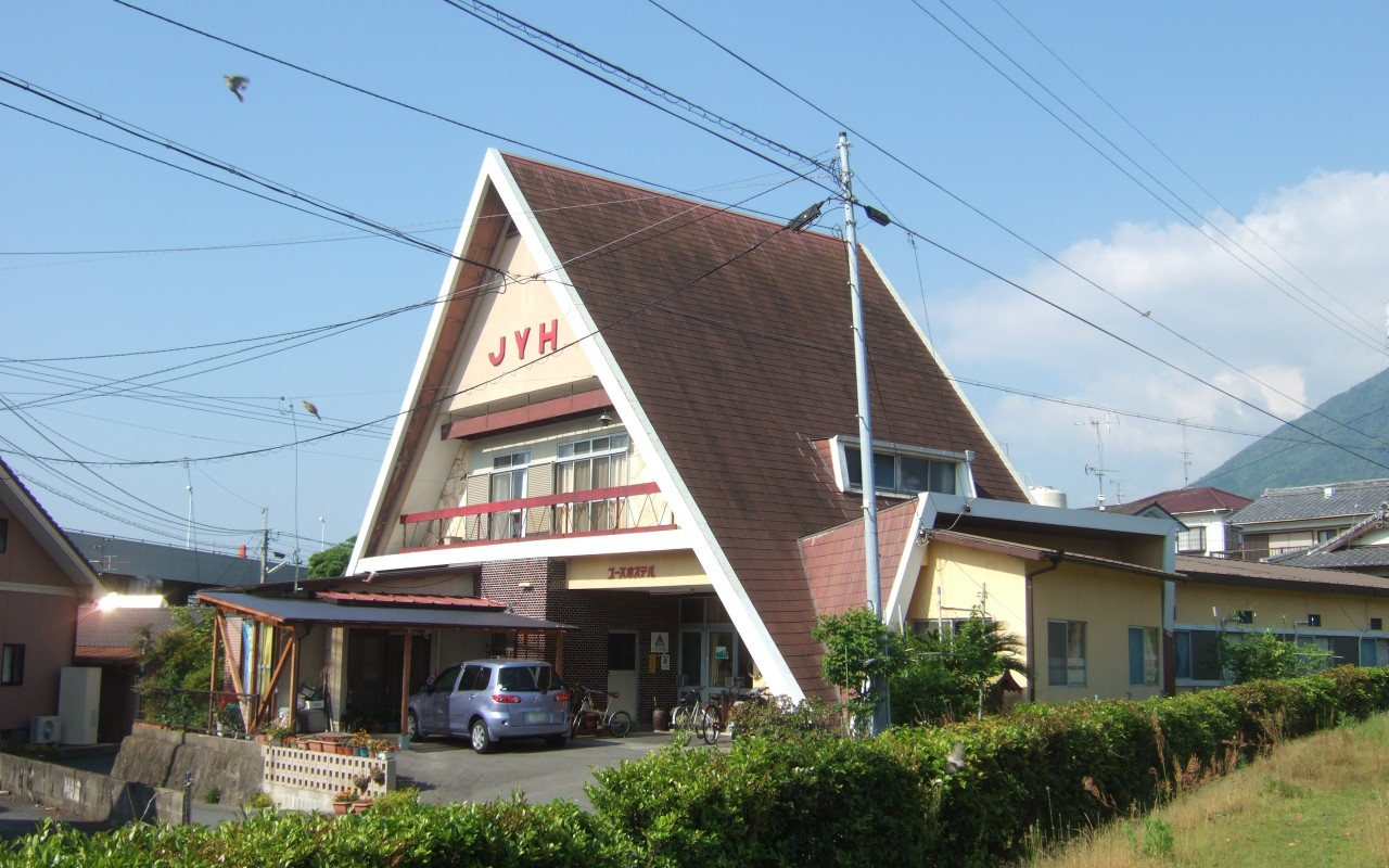 島原ユースホステル（長崎県島原市）